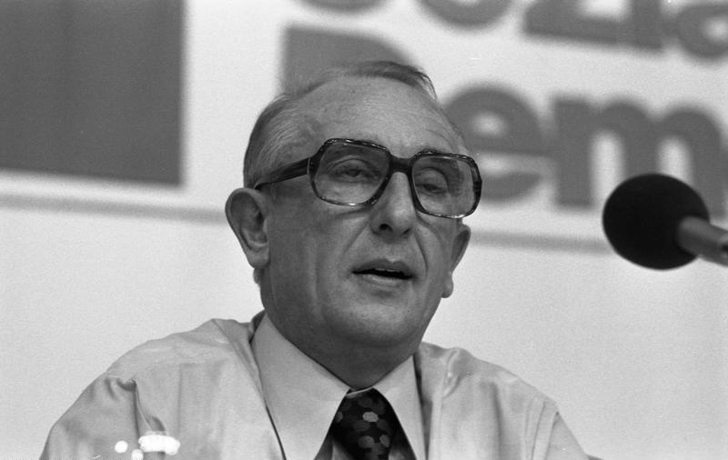 Parteitag der SPD in Mannheim (Helmut Rohde) 11.-15.11.1975